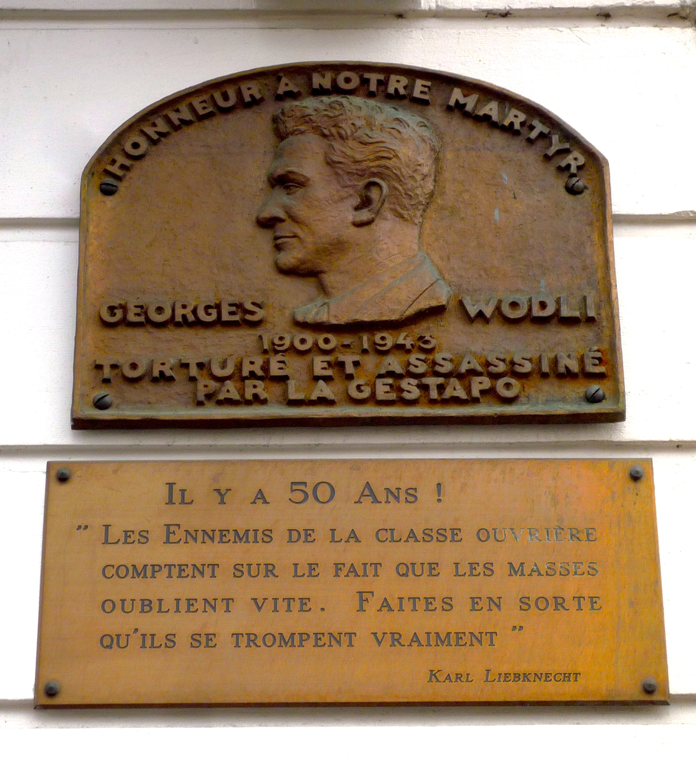 Georges Wodli est un militant communiste, syndicaliste et résistant français né le 15 juin 1900 à Schweighouse-sur-Moder (Bas-Rhin, alors en territoire allemand) et mort sous la torture au cours de la nuit du 1er au 2 avril 1943.